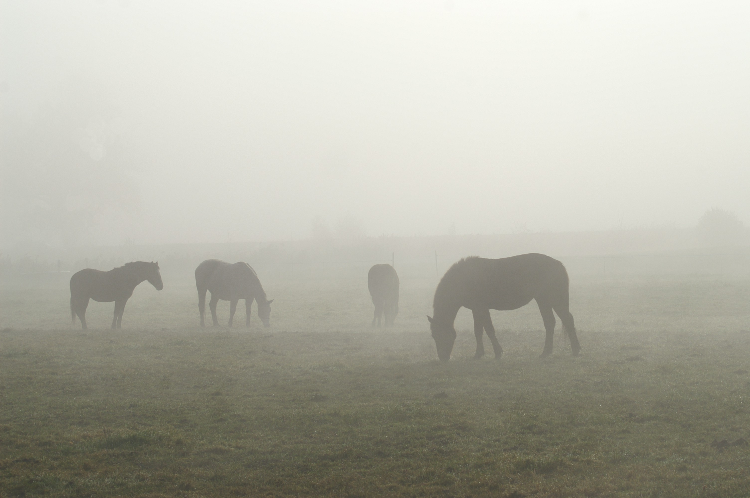 Pferde gesehen im Lustenauer Ried, an der Grenze zu Dornbirn in Vorarlberg.